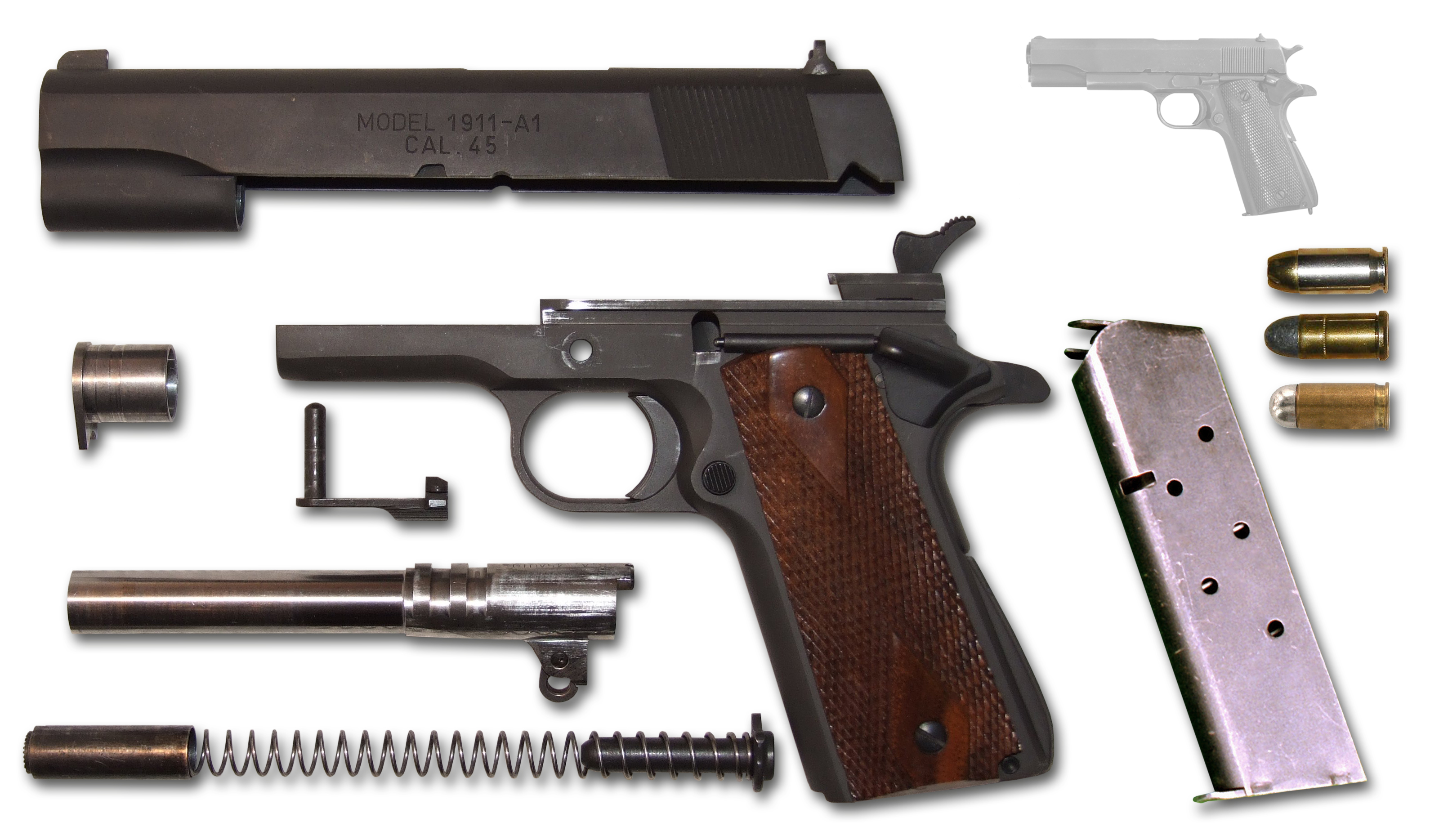 Springfield 1911-A1 (Mil Spec) Kaliber 45 ACP, teilzerlegt. Hintergrund wurde entfernt, technischer Schatten eingesetzt. Ein Magazin, verwendbare Munition und eine Ansicht der einsatzfähigen Waffe wurden hinzugefügt.